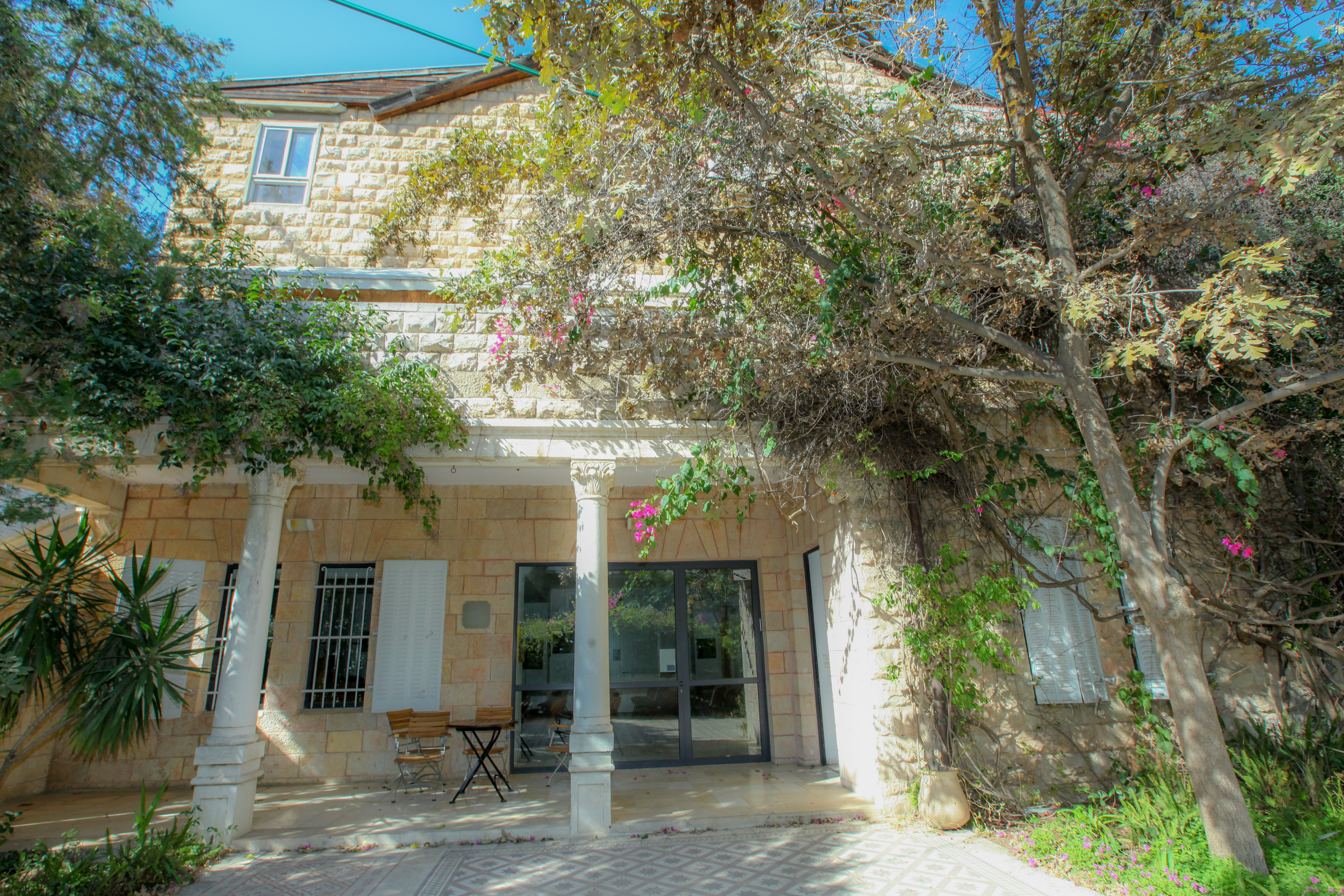 מכון ירושלים למחקרי מדיניות (לשעבר מכון ירושלים לחקר ישראל) הוא מוסד אקדמי עצמאי העוסק במחקרי מדיניות והוא המכון המוביל בישראל בחקר המציאות המורכבת והמרקם הייחודי של ירושלים